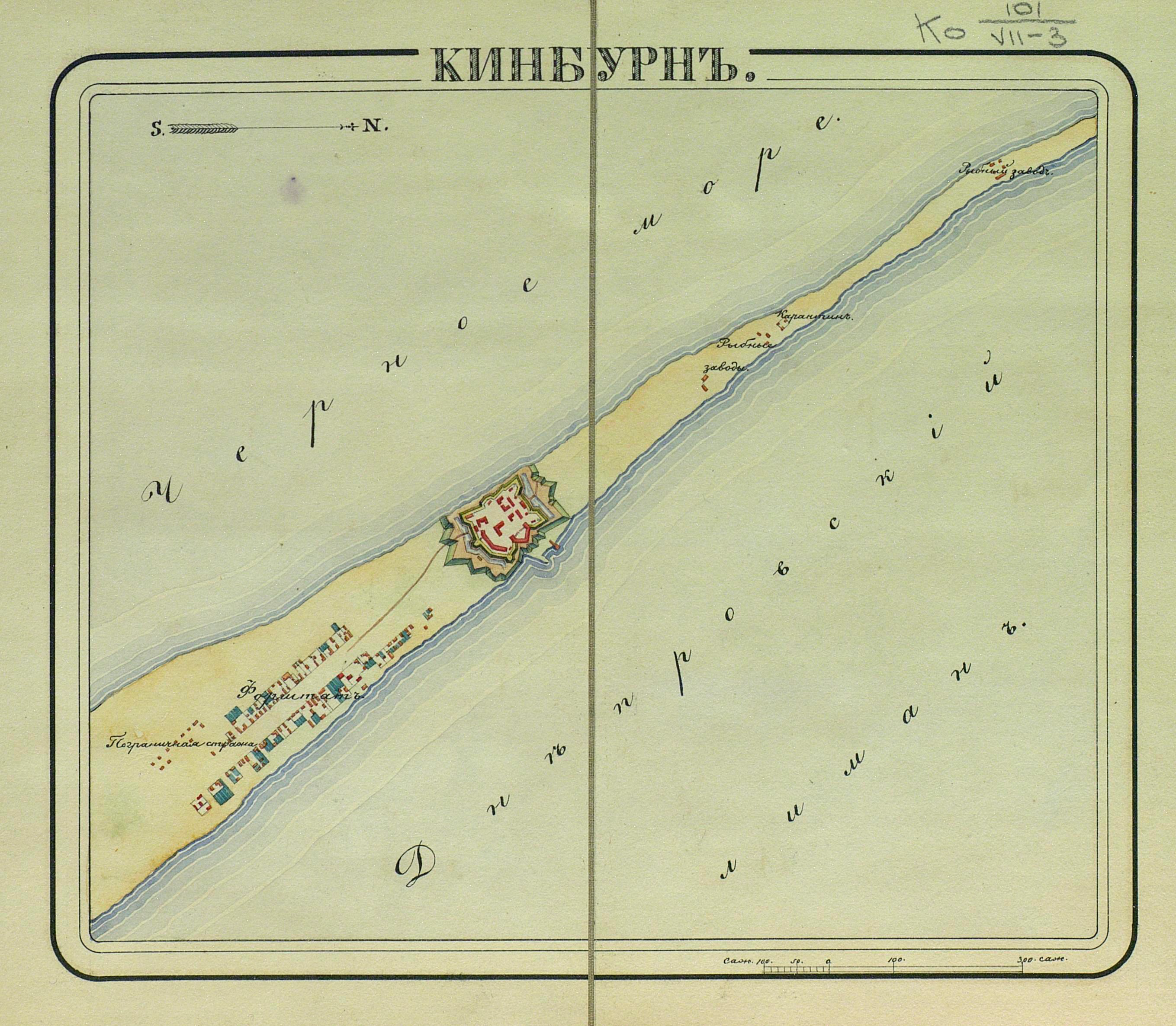 Kinburn